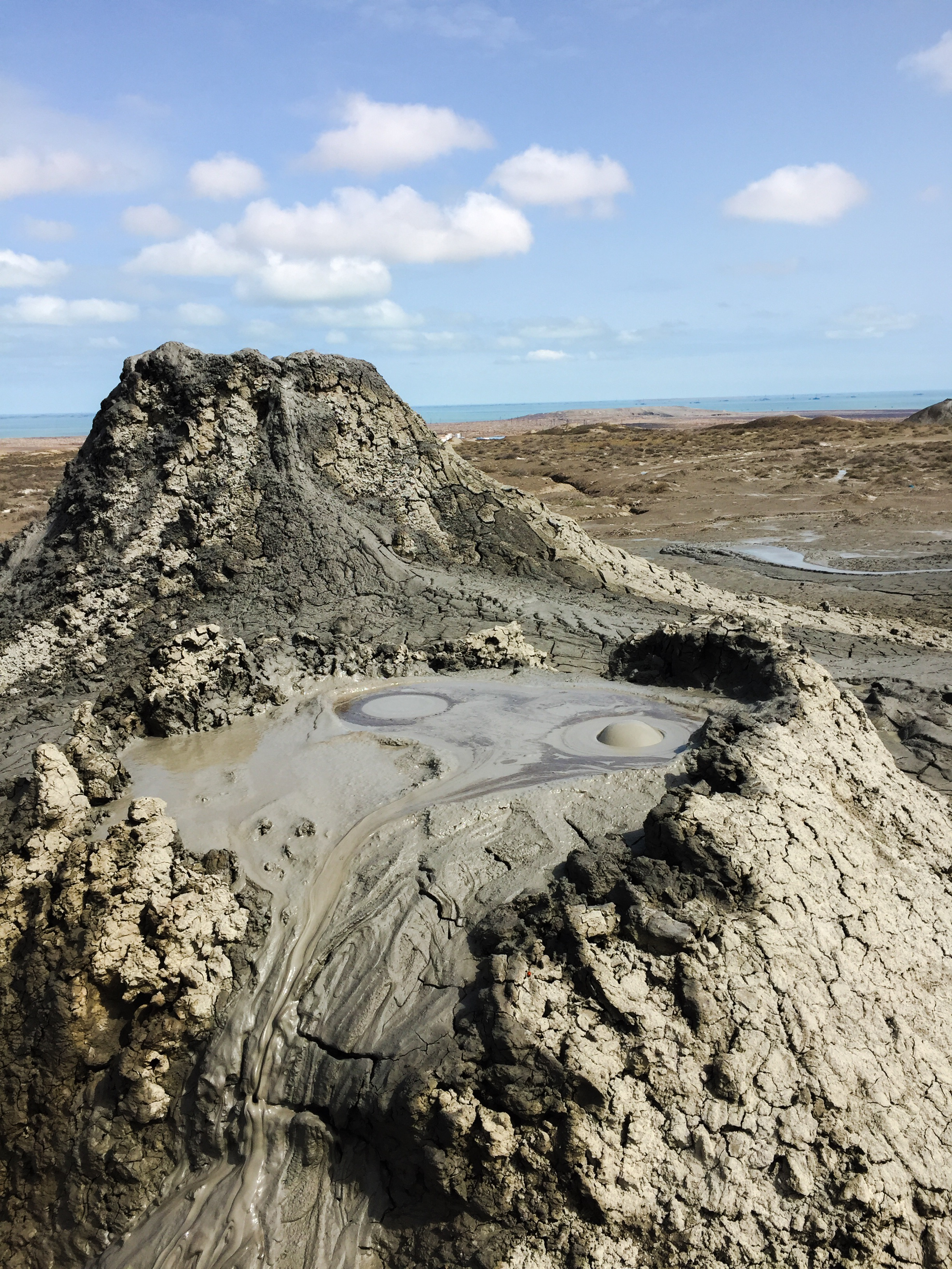 Mud vulcanoes in Azerbaijan. 2